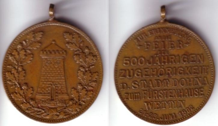 Medaille 1902, zur 500jährigen Zugehörigkeit Dohnas zum Fürstenhaus Wettin